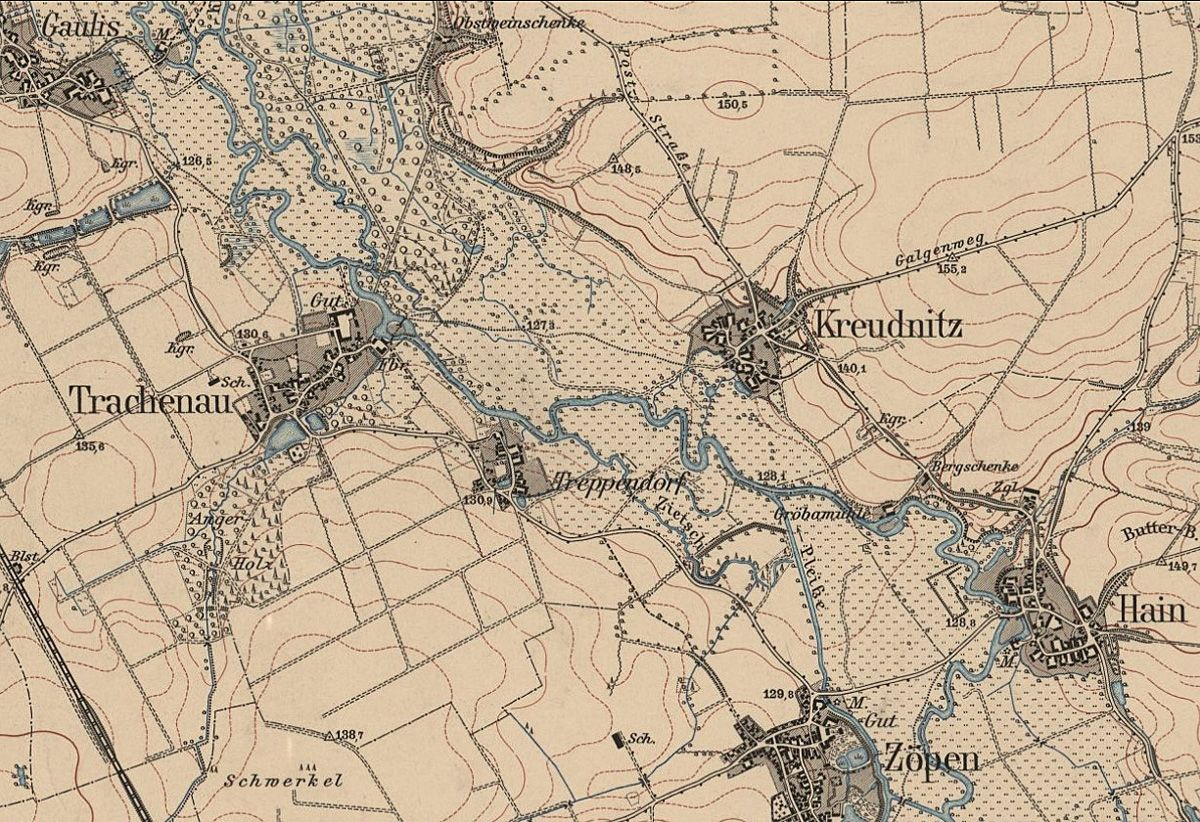 Kreudnitz auf eine Karte von 1908